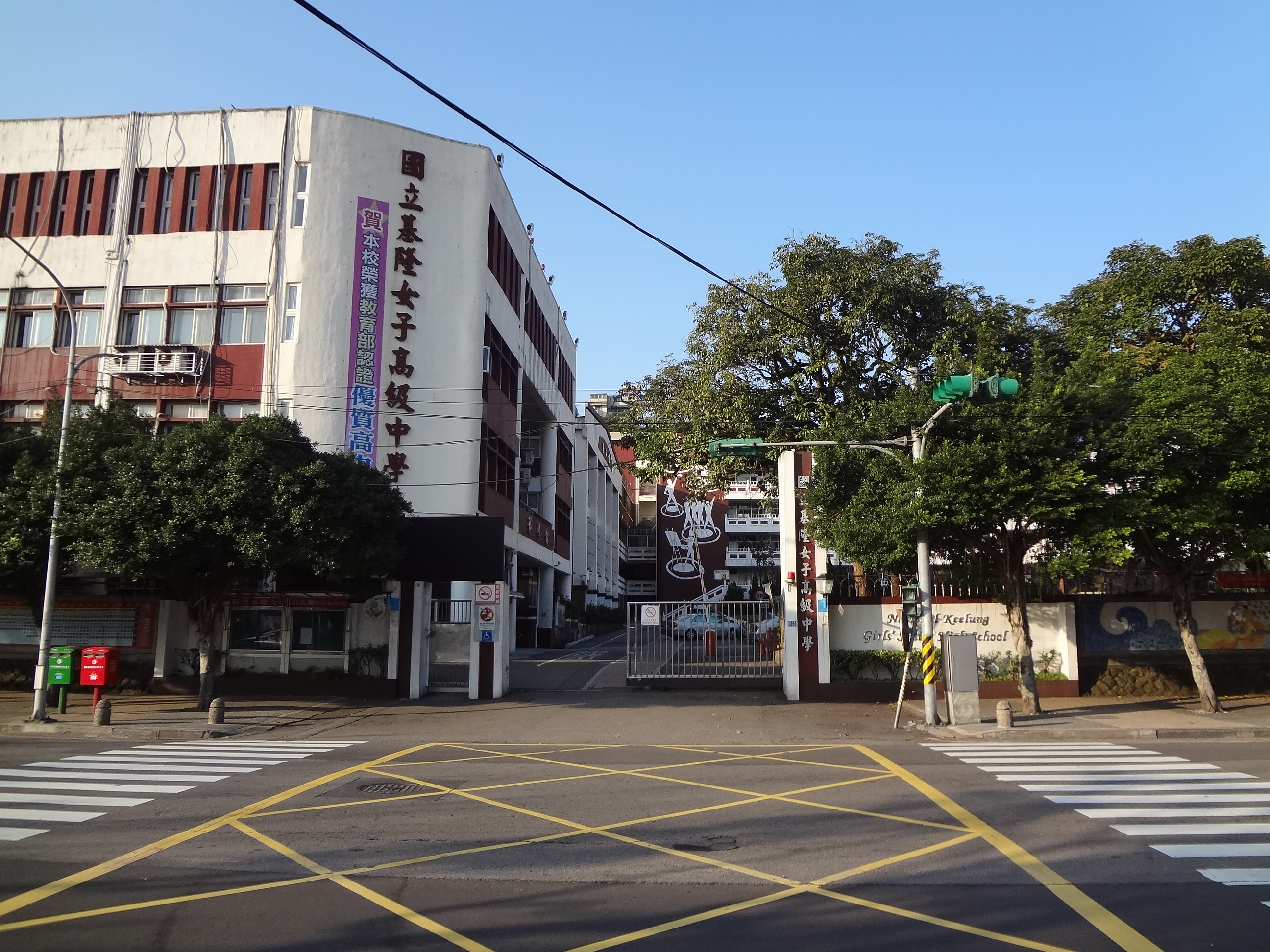 中文（台灣）: 國立基隆女子高級中學，位於基隆市信義區東信路324號。